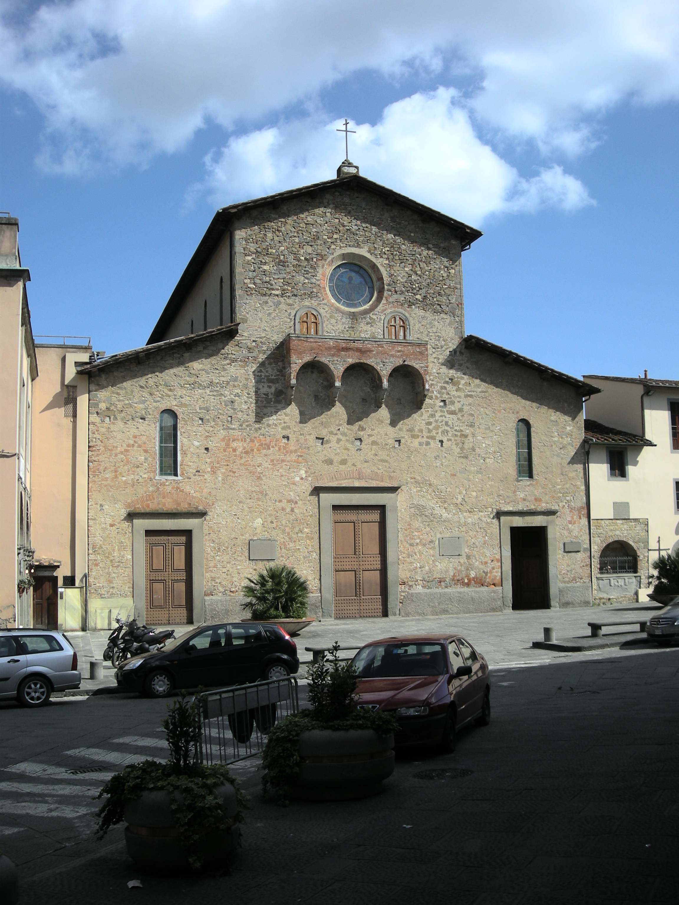 Chiesa di San Giovanni, Signa Italy